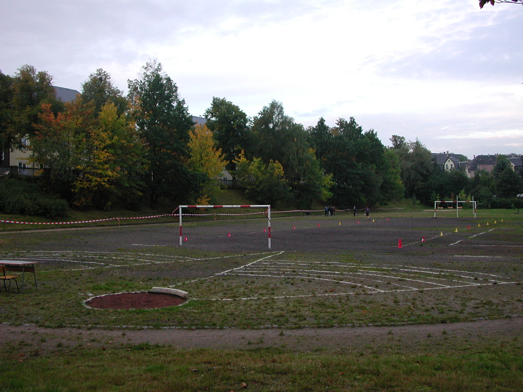 Alter Sportplatz des Johann-Heinrich-Pestalozzi-Gymnasiums Rodewisch